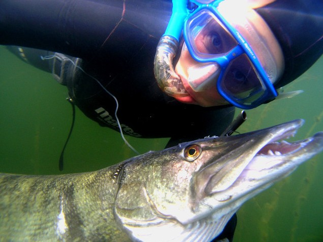 makeanveden hauki